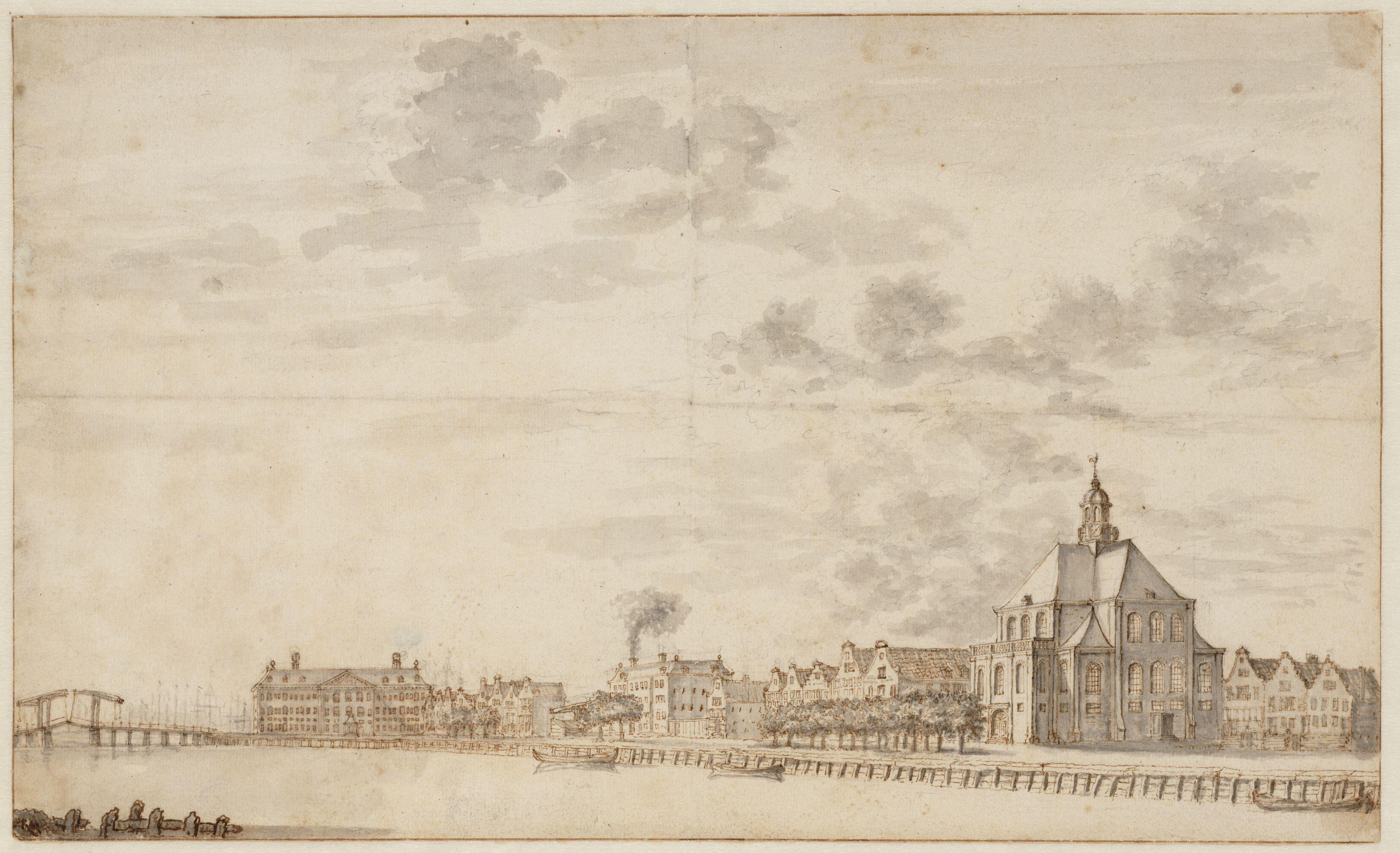 De Oosterkerk en 's Lands Zeemagazijn in Amsterdam (De kattenburgerbrug is de grote brug; een ophaalbrug, de latere Paerlduiker, is te zien onder de rook van de schoorsteen in het midden.